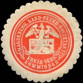 Sealing stamp Title: Kreis Versicherungskommissar - Magdeburger Land - Feuer - Societaet Description: rot, weiß, geprägt Place: Magdeburg size: 4 cm